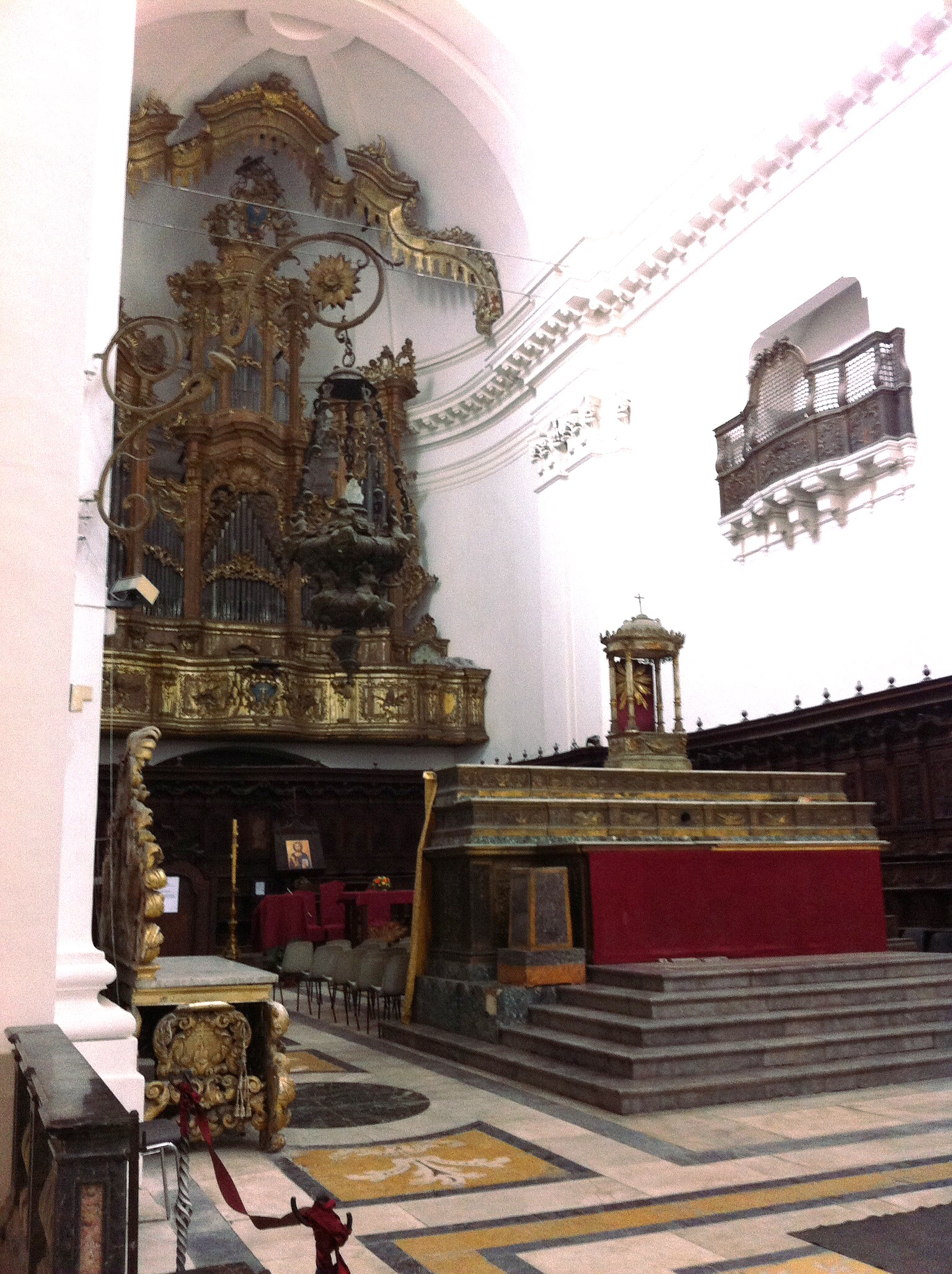 Chiesa di San Nicolò l'Arena (Catania), già dei Padri Cassinesi - Organo di Donato Del Piano (costruito a partire dal 1755). Foto di L. Gennaro